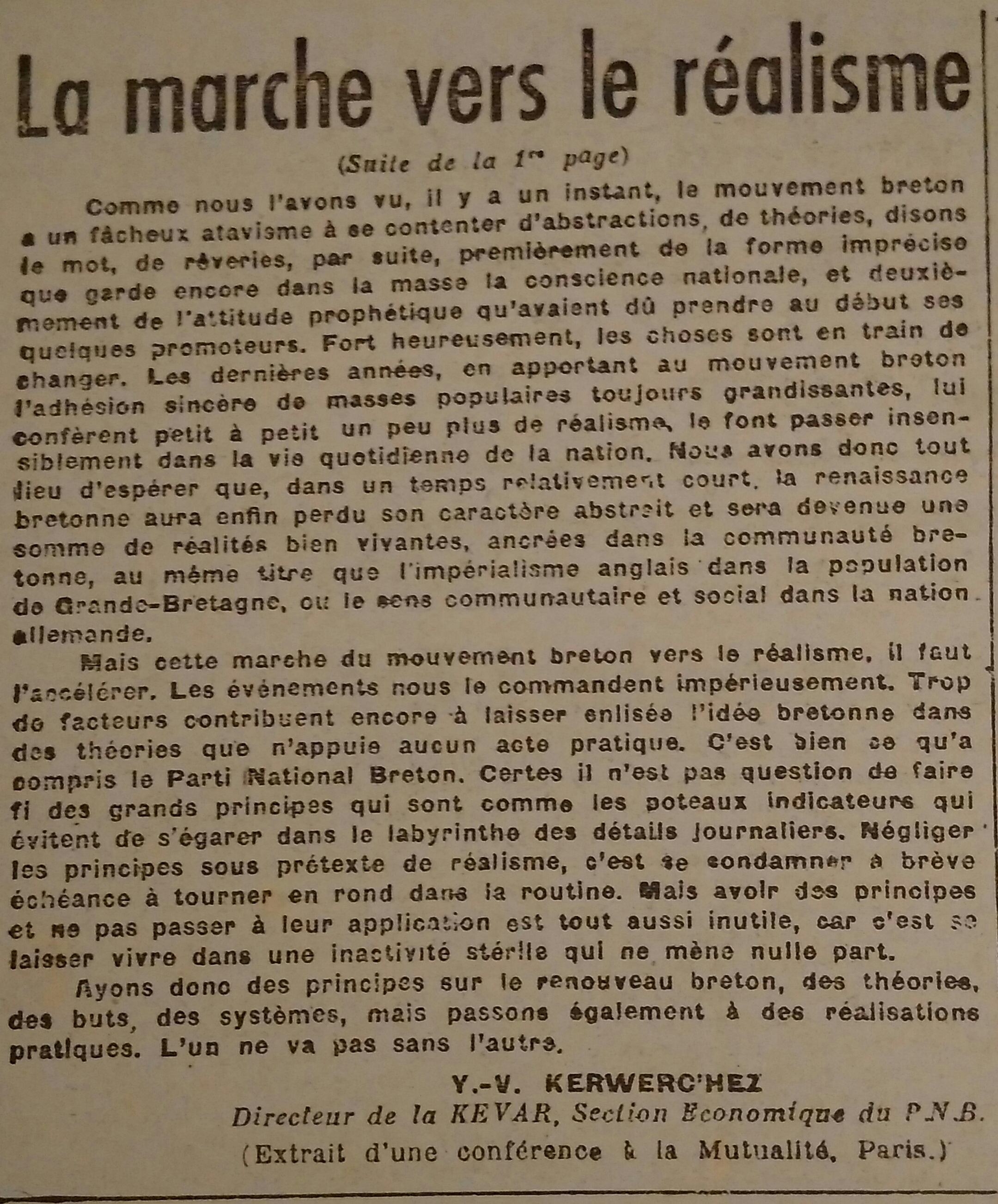 Prezegenn gant Yann-Vari Kerwerc'hez embannet er gazetenn l'Heure Bretonne (Niverenn 177, 12 a viz Kerzu 1943)